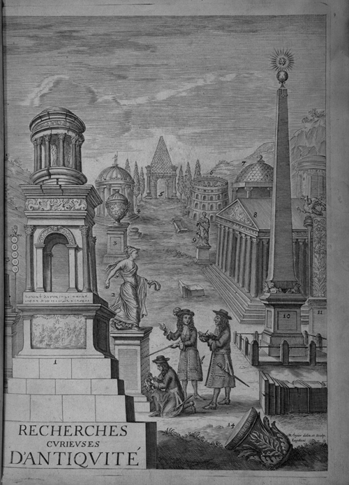 Frontispiece of Recherche des antiquités et curiosités de la ville de Lyon by Jacob Spon